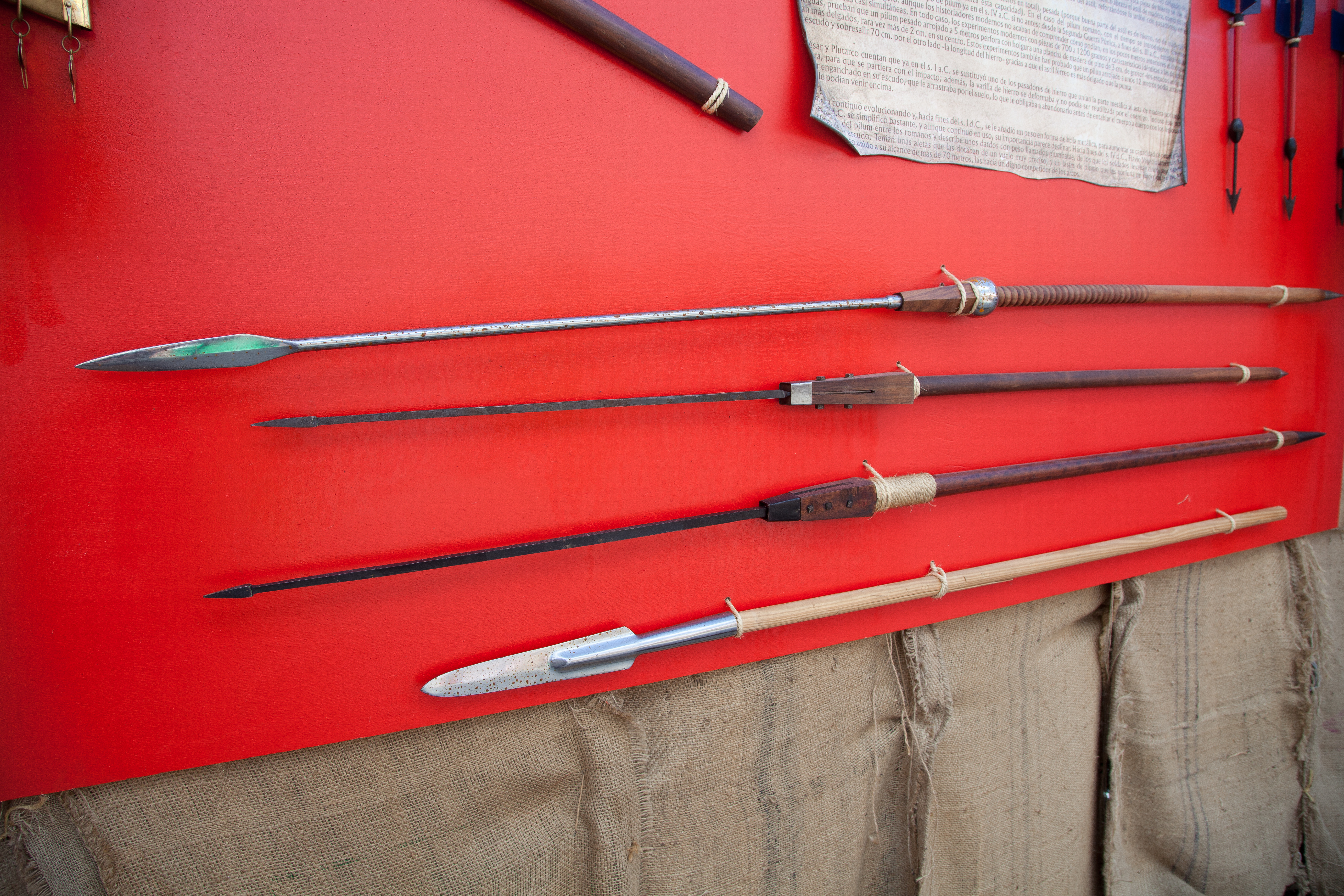 Pilum. Arde Lucus 2011. Lugo, Galiza